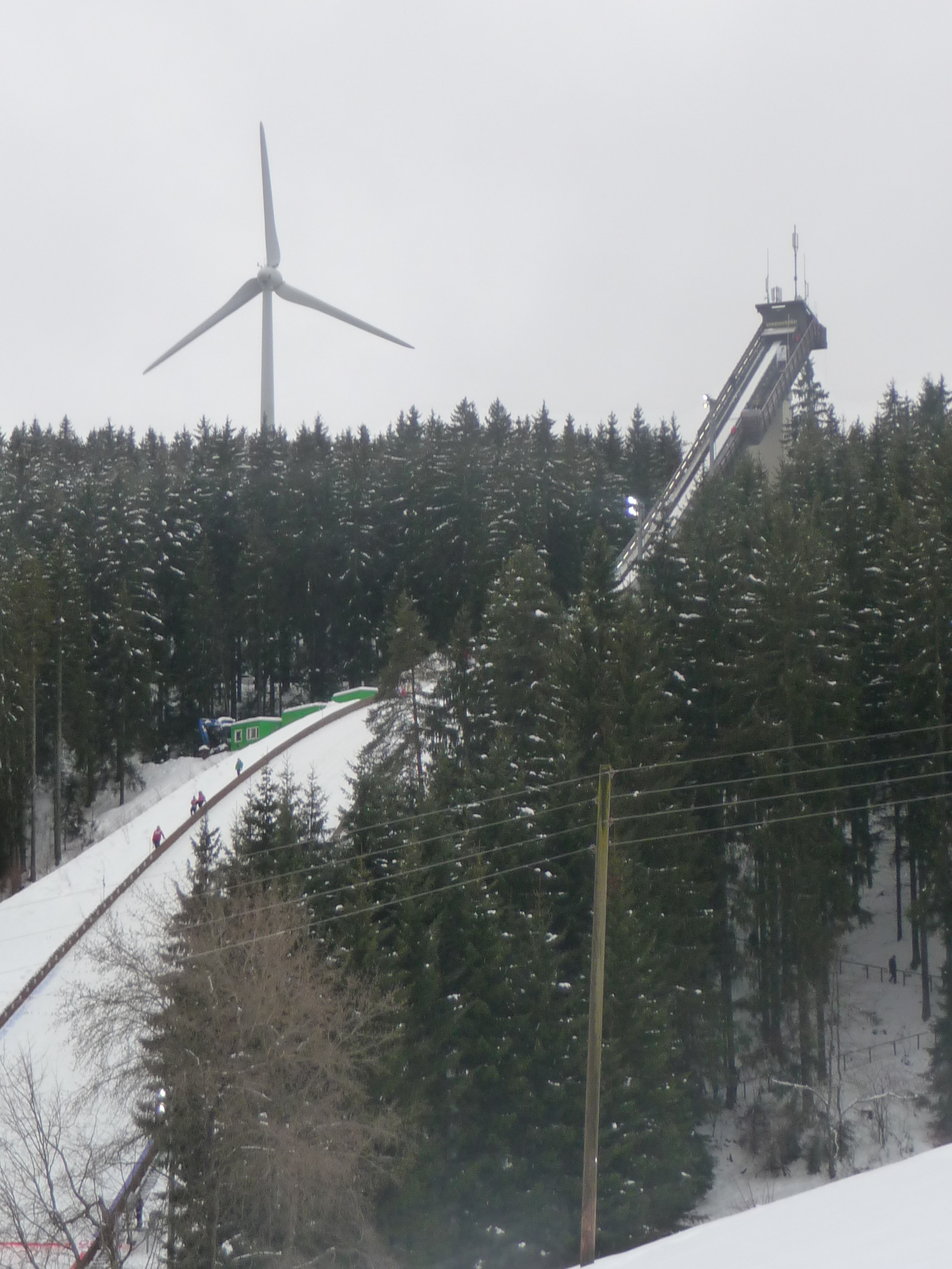 Weltcup Nordische Kombination 5. März 2016 in Schonach, Langenwaldschanze